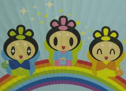 キラリ姫イラスト